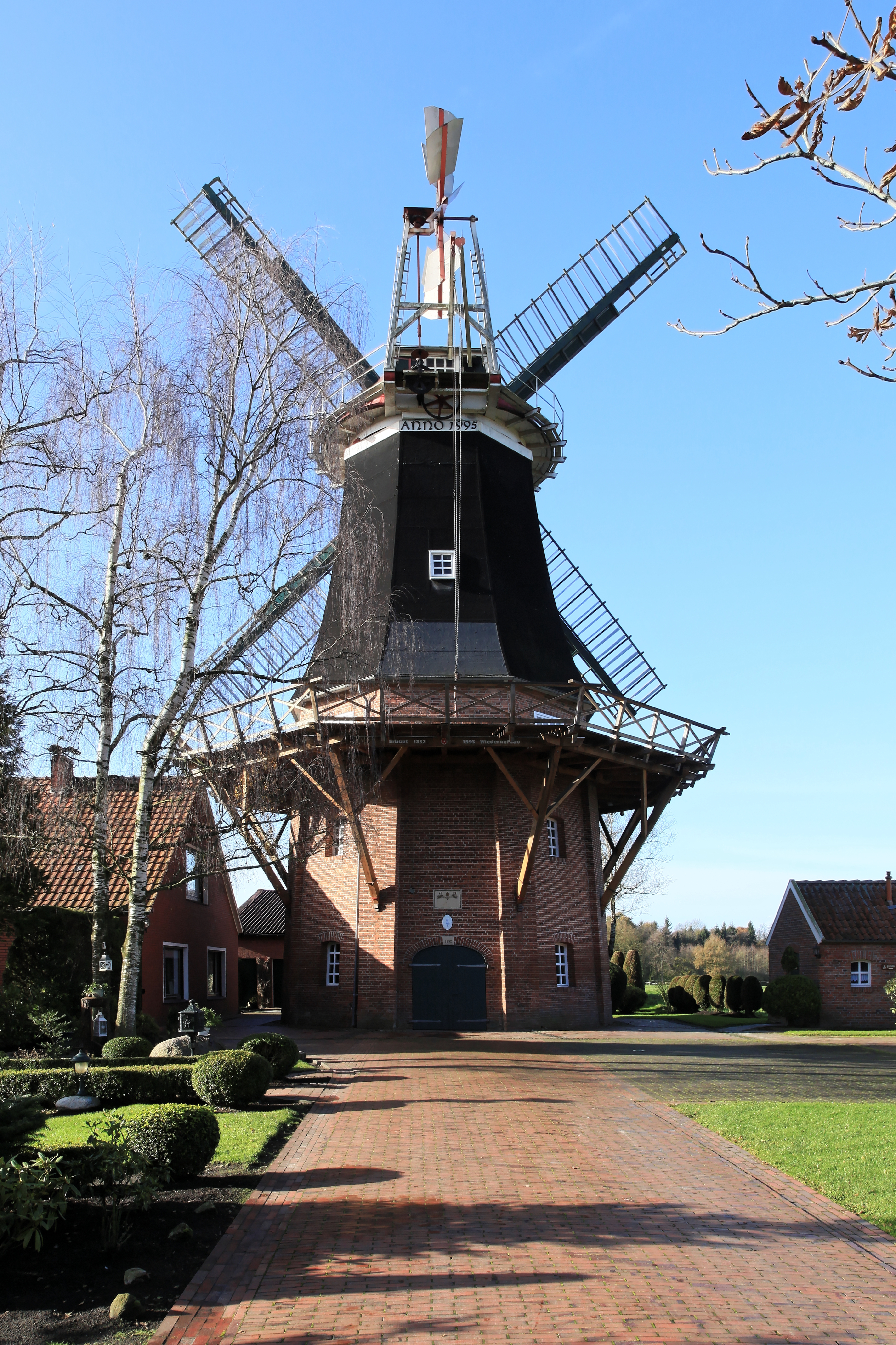 Mühle Rhaude-Holte, Rhauder Mühlenweg in Rhauderfehn